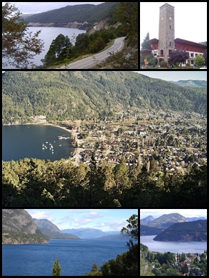 Montaje de San Martin de los Andes, Patagonia Argentina